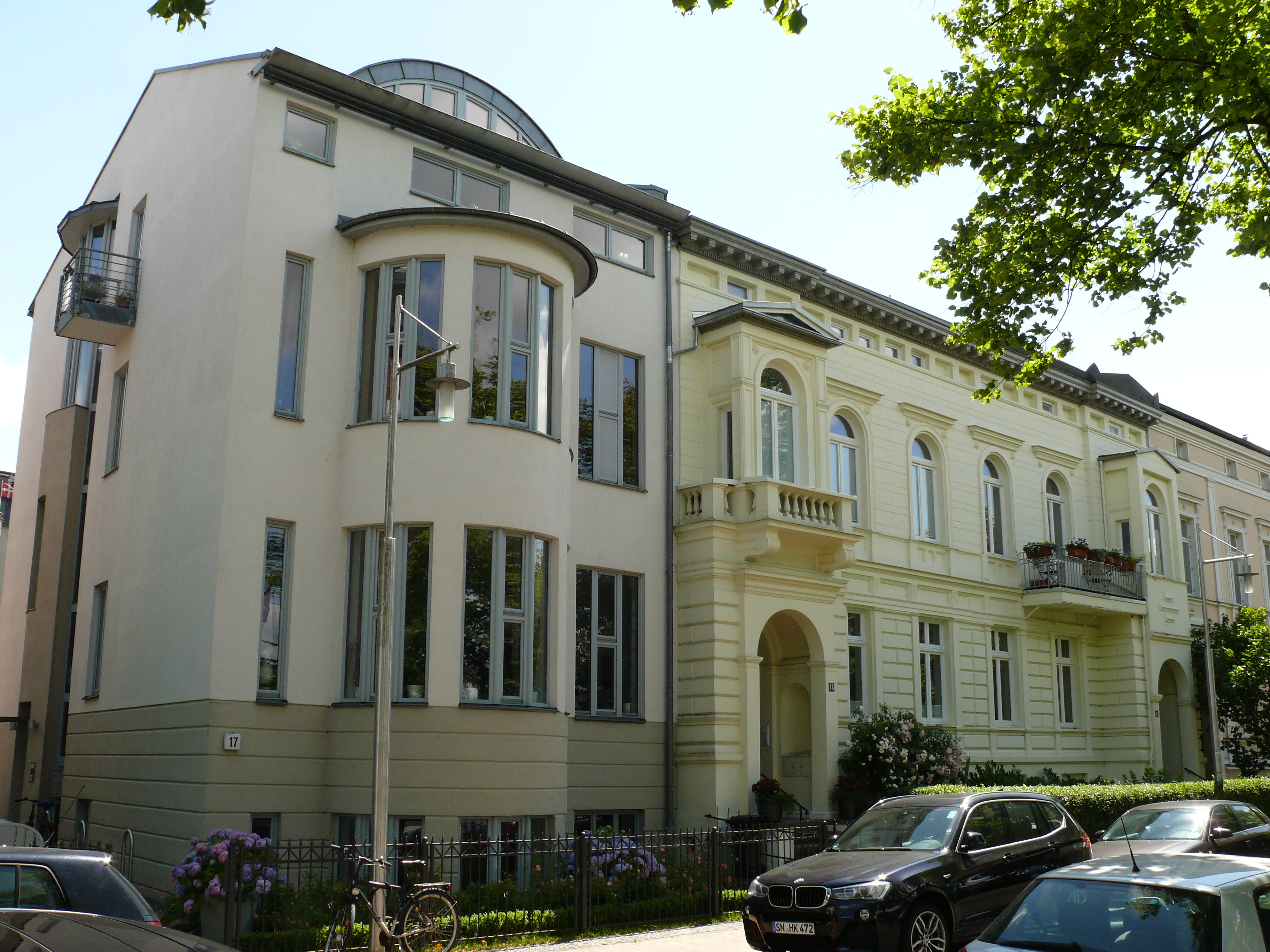 Die Gebäude "August-Bebel-Straße 17 (links), sowie 16+15 (rechts)" in Schwerin.